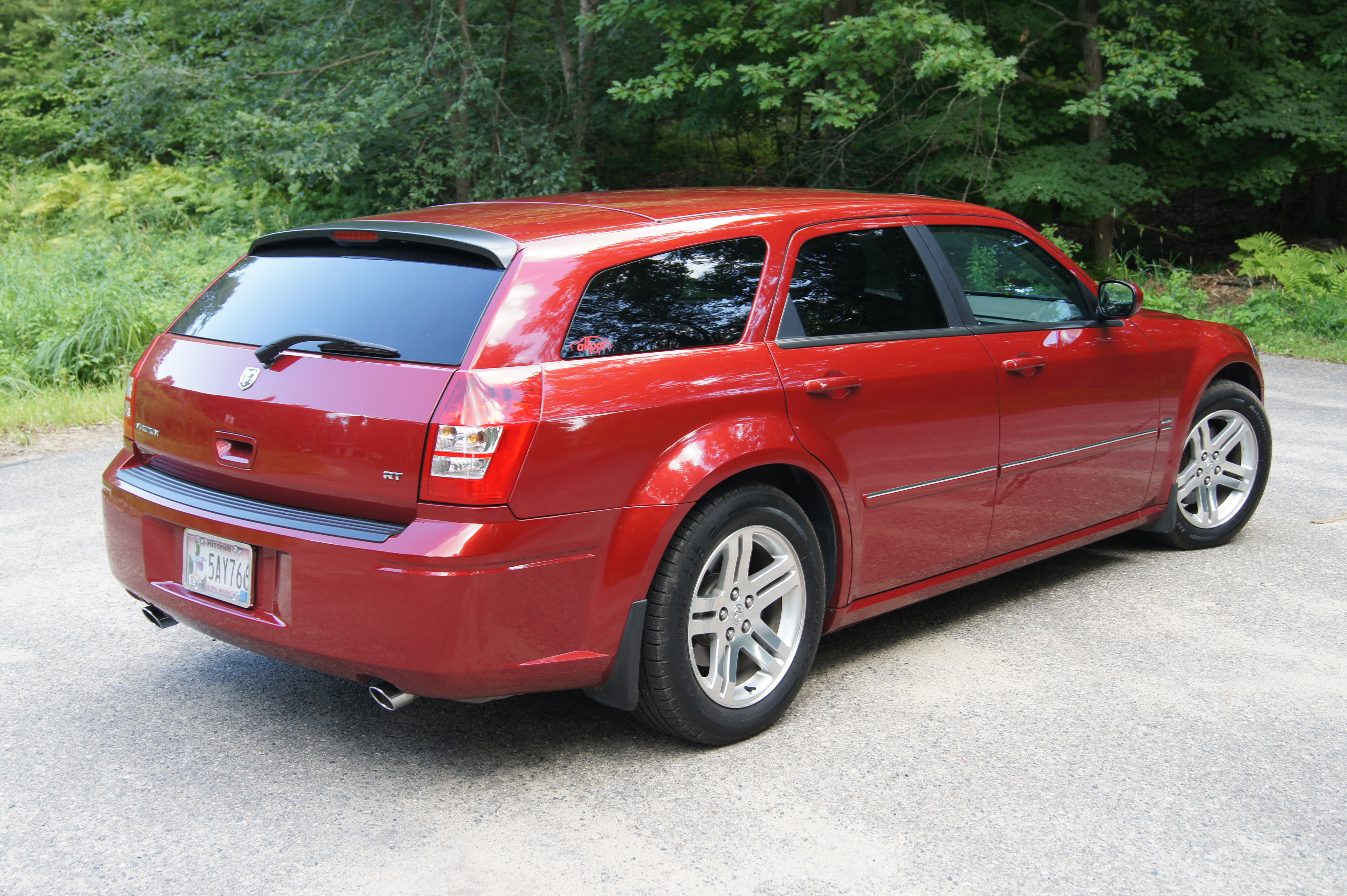 05 Dodge Magnum RT